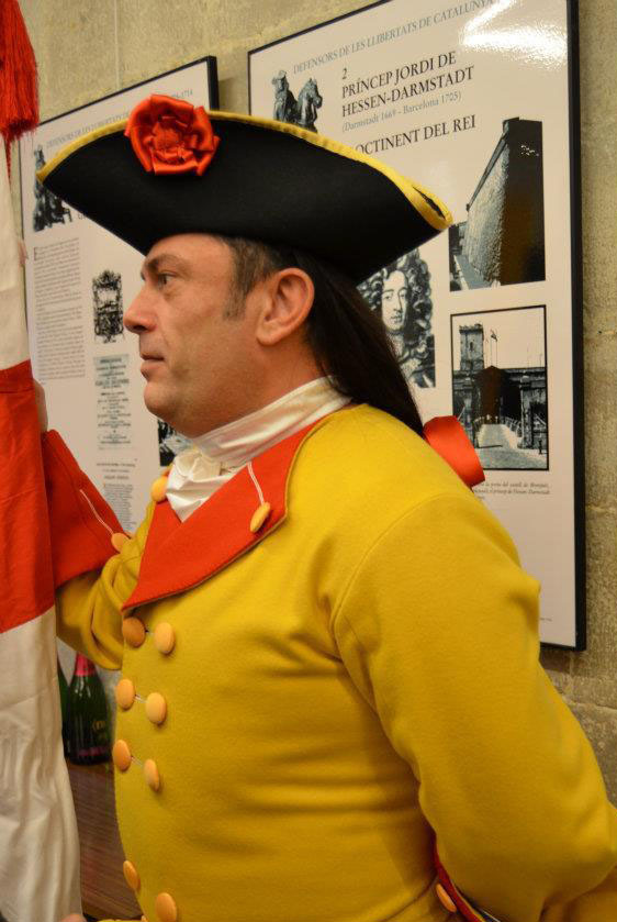 Recreación histórica a cargo de la «Associació de Recreació Històrica la Coronela de Barcelona»